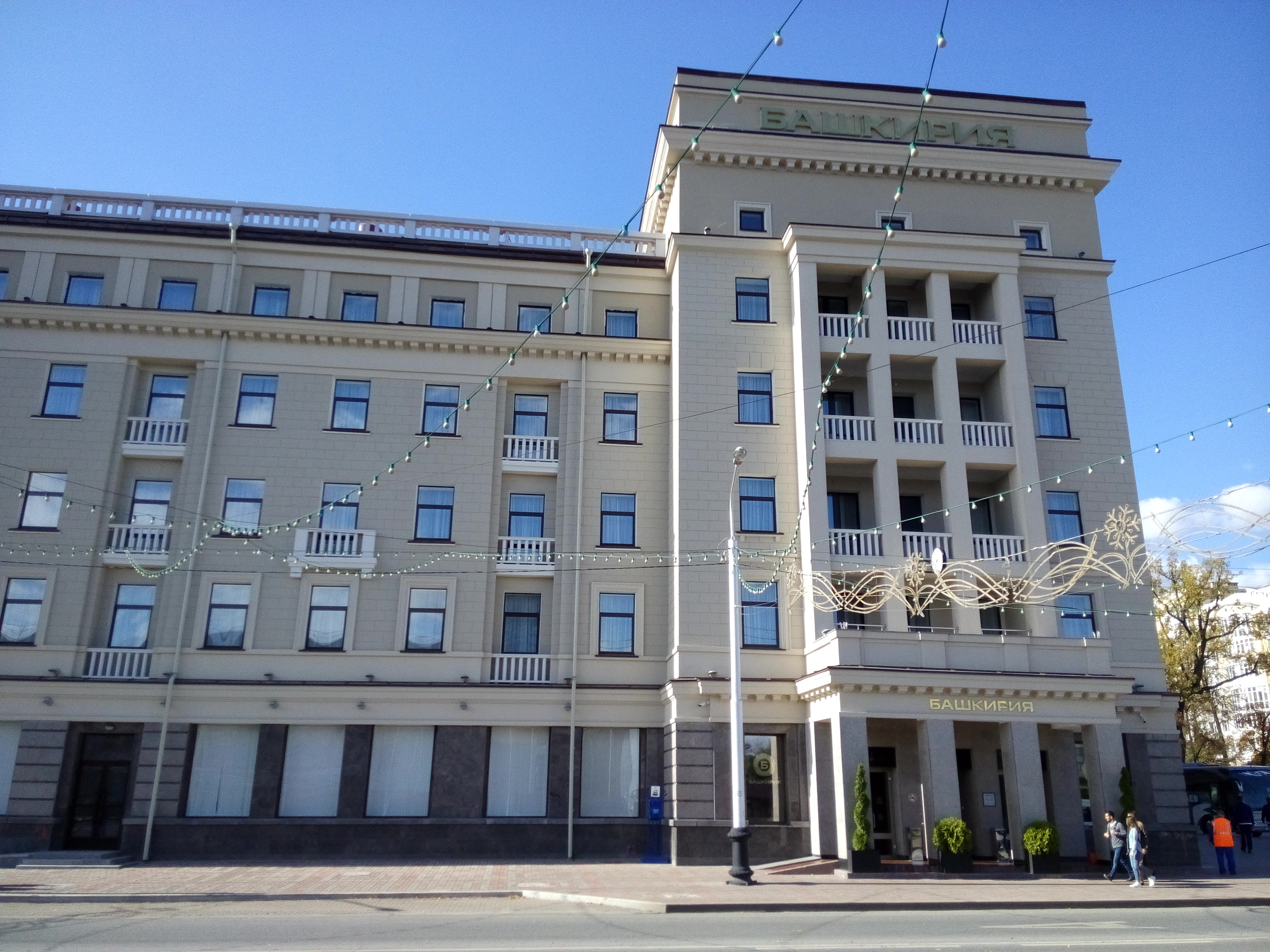 Гостиница "Башкирия": улица Ленина, 25/29, Уфа, Башкортостан